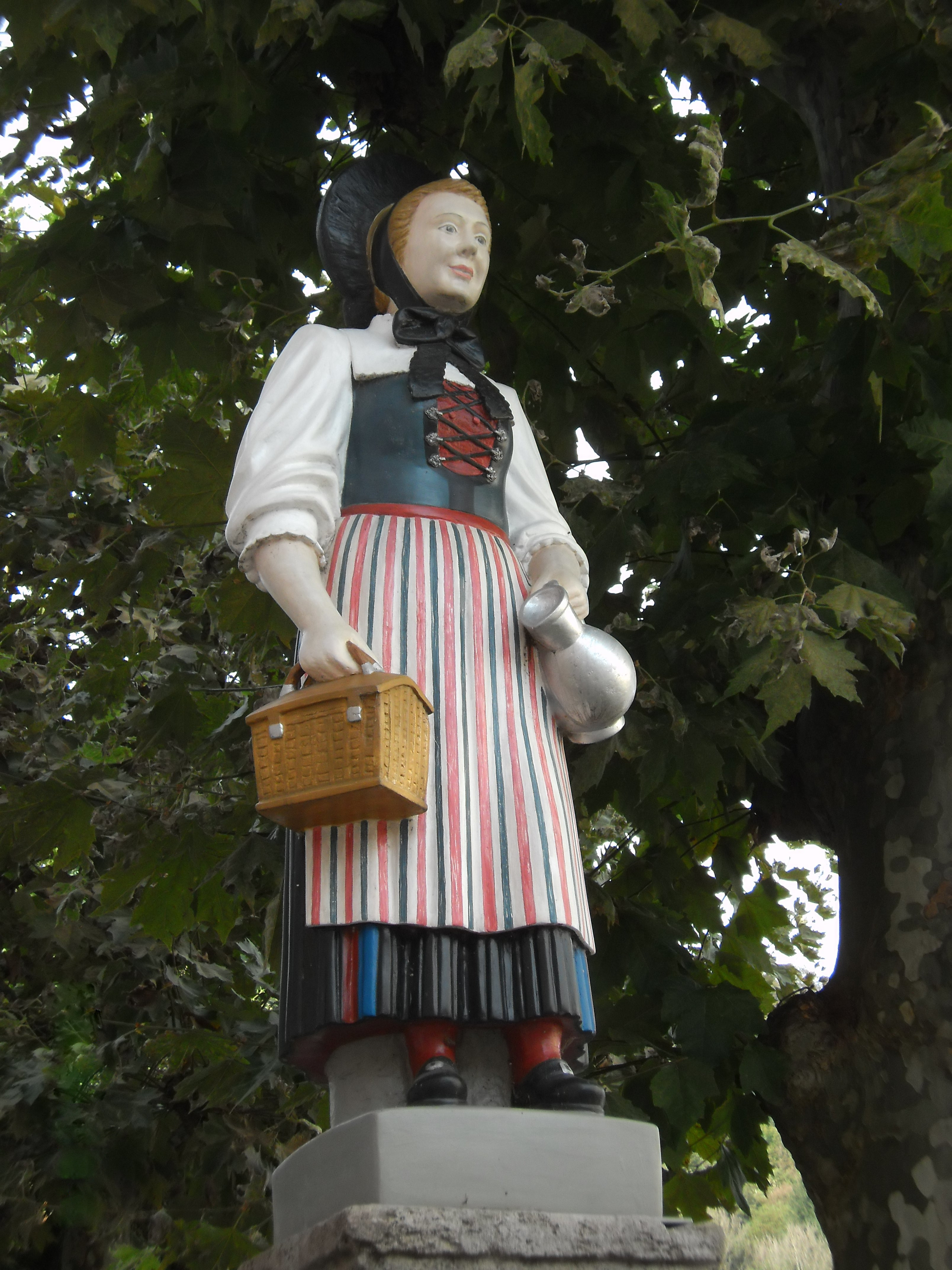 Holzskulptur, Marktfrau mit der Klettgauer Tracht auf dem Marktplatzbrunnen Tiengen